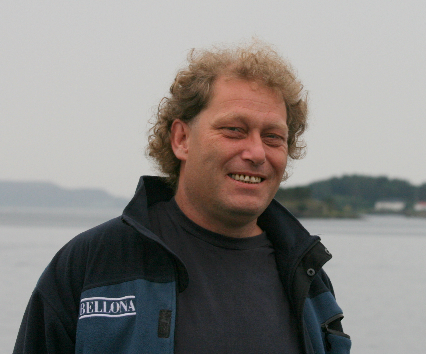 Frederic Hauge in Stavanger